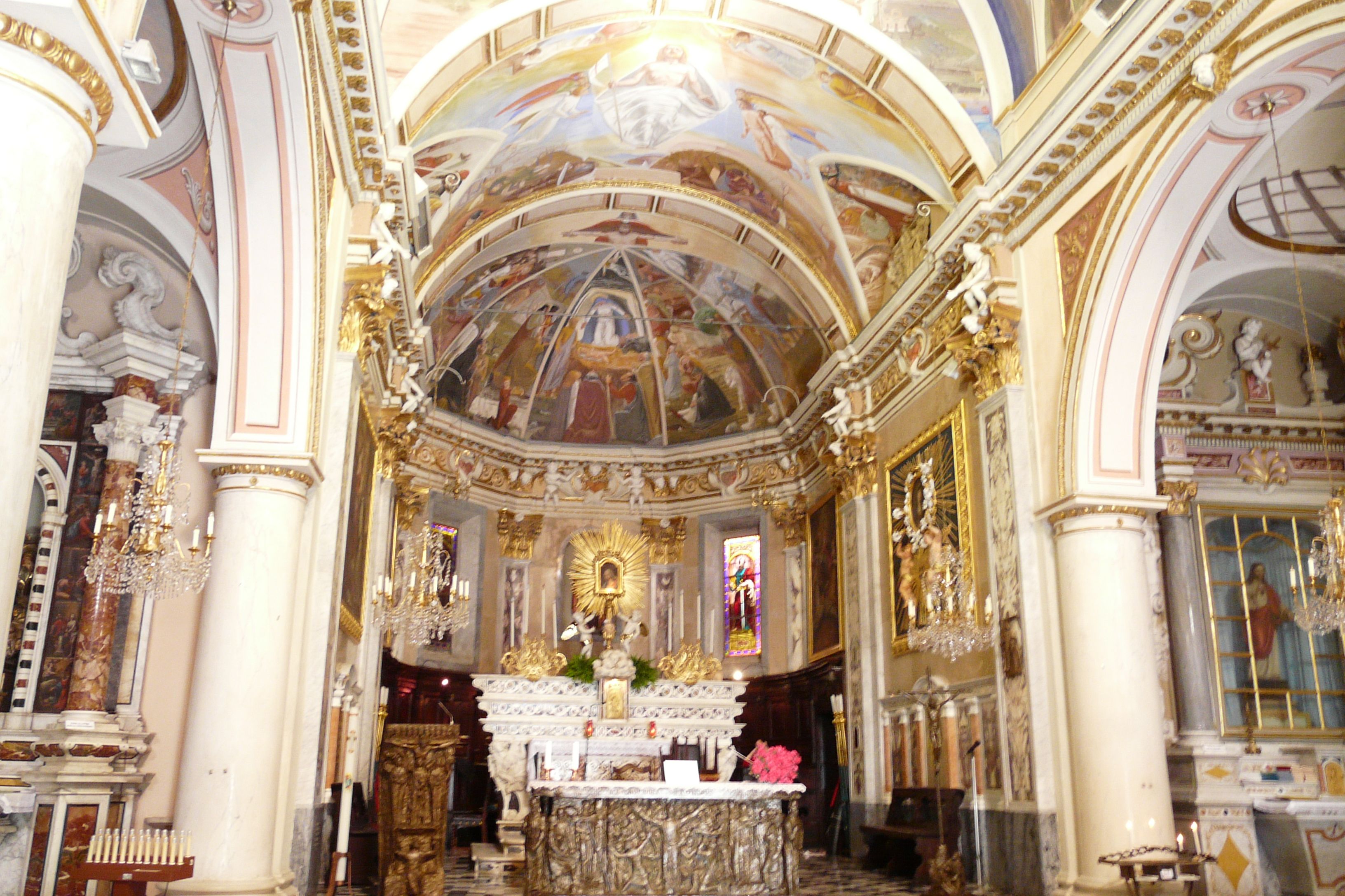 Chiesa di Sant'Ambrogio, Zoagli, Liguria, Italia